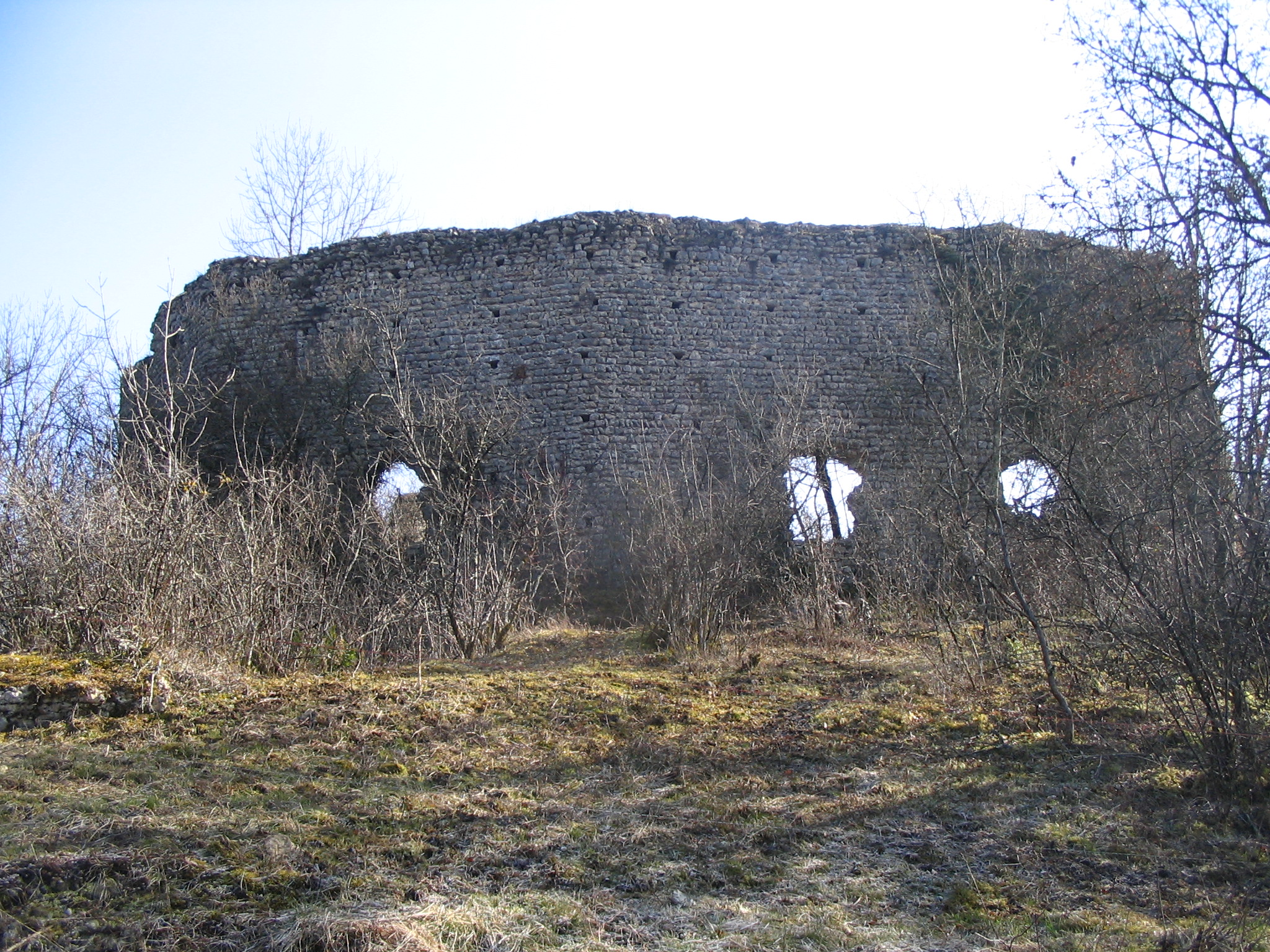 Château de Cordon - Brégnier-Cordon, dans le département de l'Ain - France